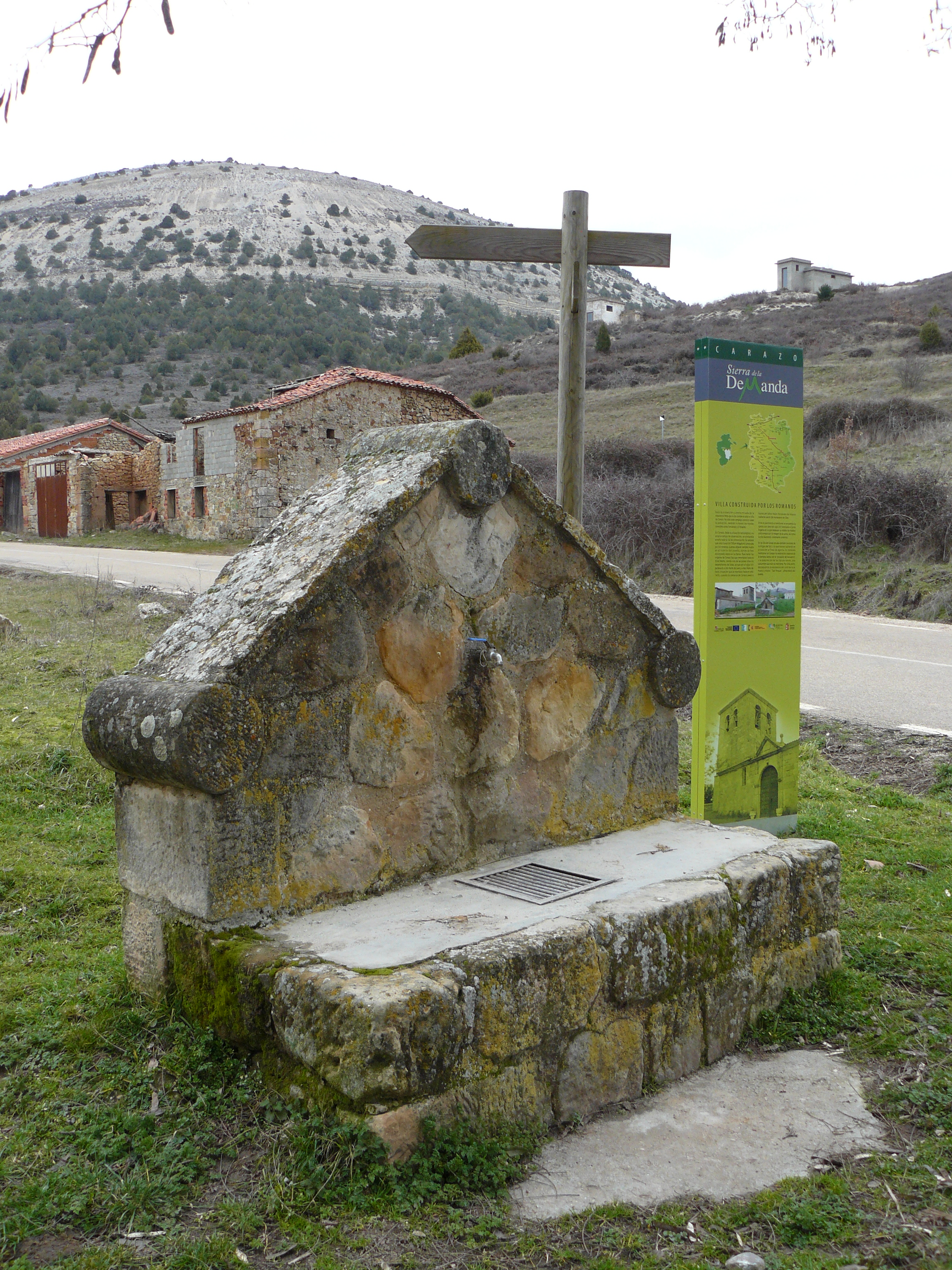 Carazo, Burgos.